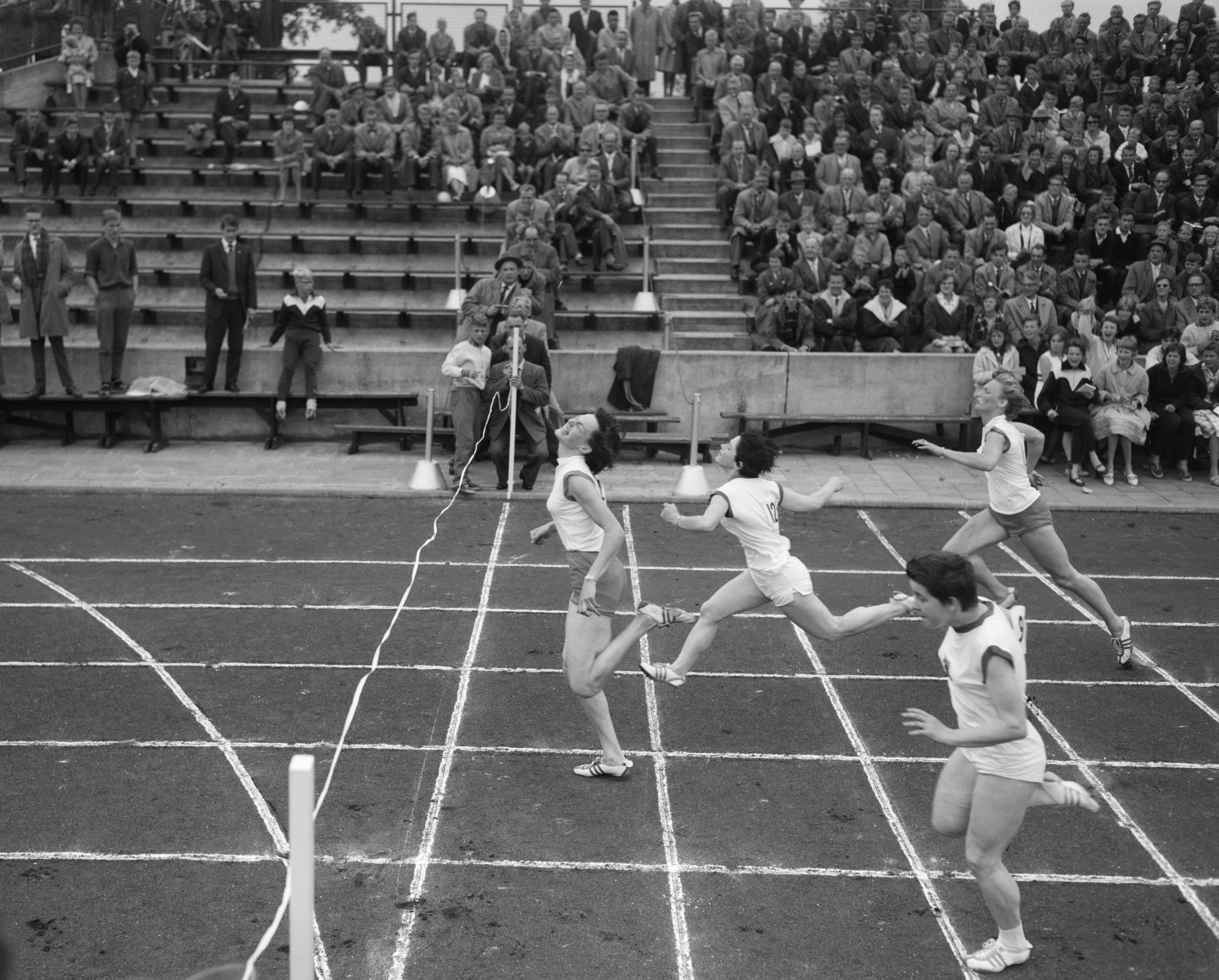 Collectie / Archief : Fotocollectie Anefo Reportage / Serie : [ onbekend ] Beschrijving : Damesatletiek Nederland tegen Duitsland in Enschede. E. Ort , R. Bronsack , M. Langbein , R. Kuyk Datum : 9 juli 1961 Locatie : Enschede Trefwoorden : atletiek Persoonsnaam : Bronsack, R., E. Ort, Kuyk, R., Langbein, M. Fotograaf : Bilsen, Joop van / Anefo Auteursrechthebbende : Nationaal Archief Materiaalsoort : Negatief (zwart/wit) Nummer archiefinventaris : bekijk toegang 2.24.01.04 Bestanddeelnummer : 912-7161